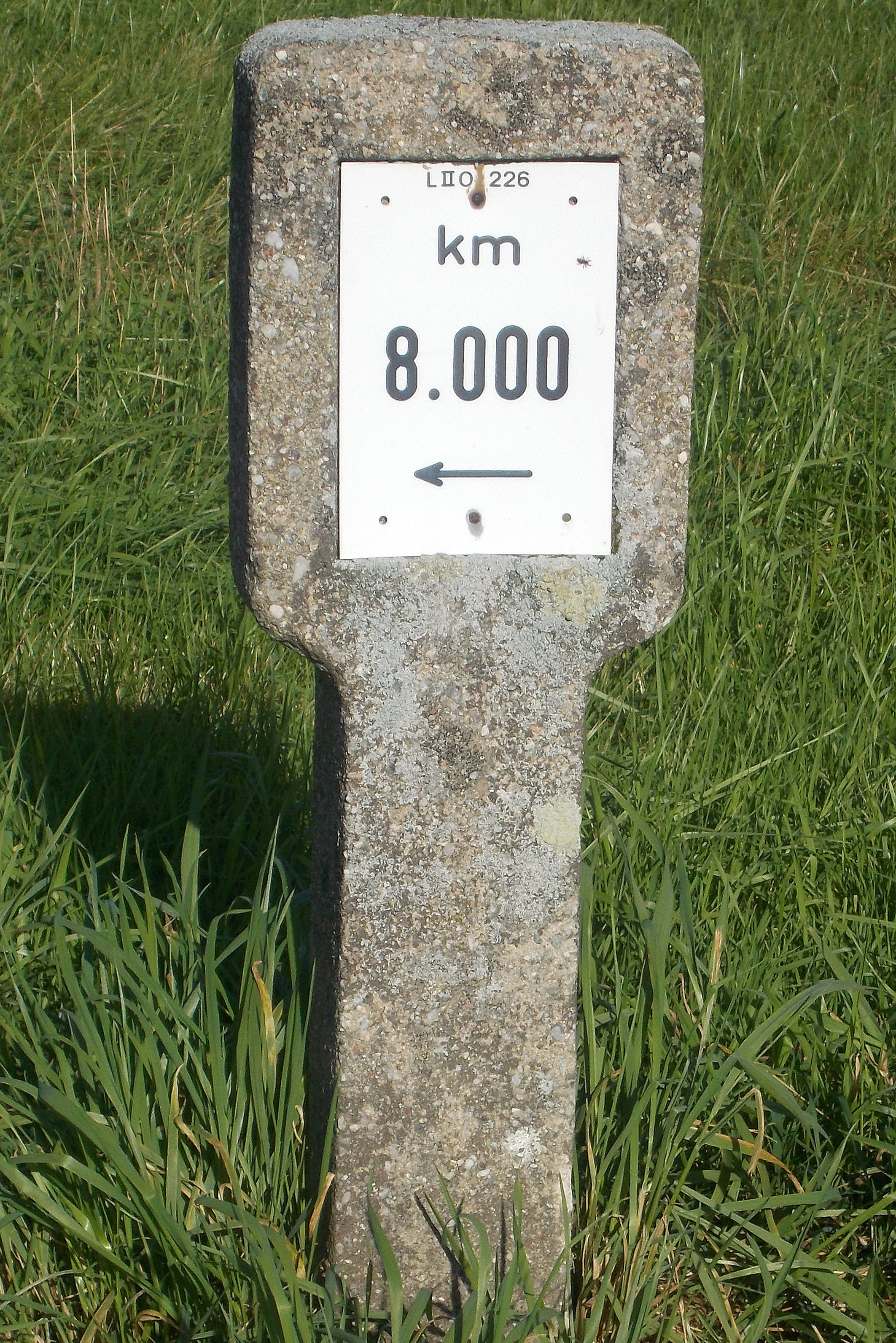 Alter DDR-Kilometerstein einer Landstraße II. Ordnung bei Rammenau-Röderbrunn